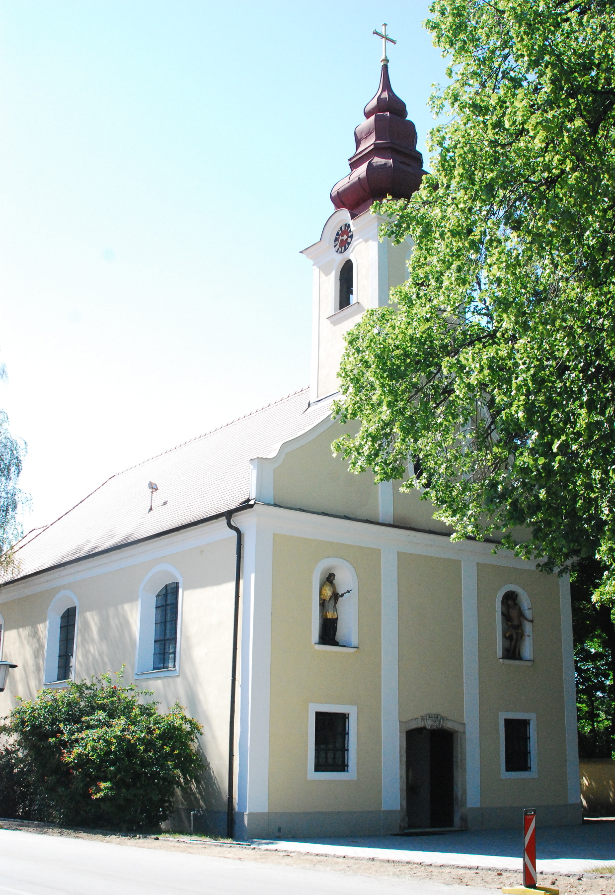 katholische Pfarrkirche heiliger Ägydius